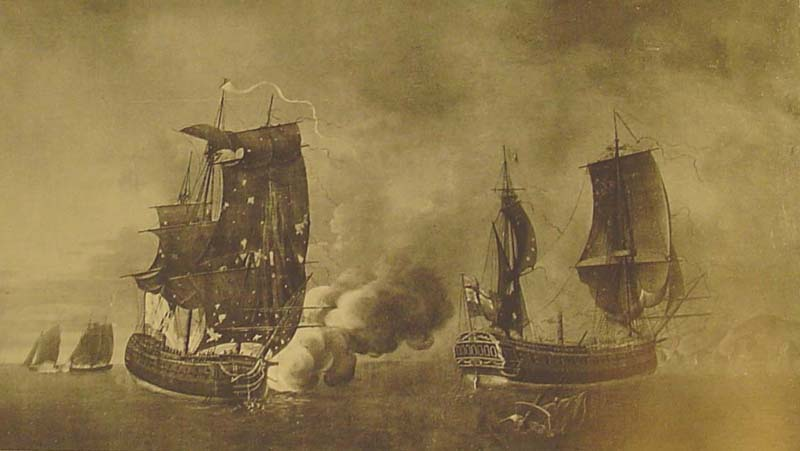 Seegefecht zwischen der französischen Fregatte Belle Poule und der britischen Fregatte Arethuse am 17. Juni 1778 (Gemälde von Rossel)